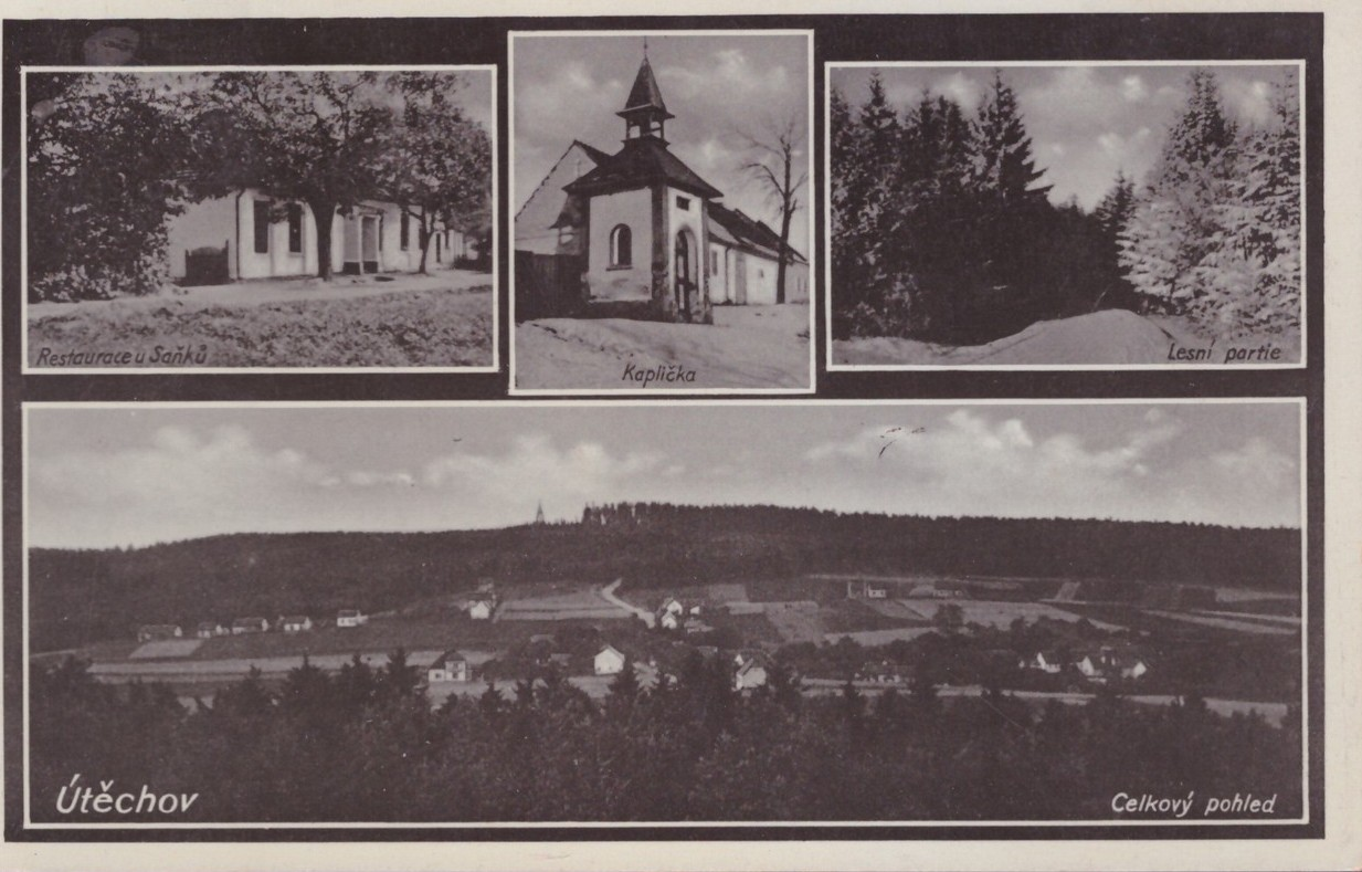 Útěchov, Brno - pohlednice z doby první republiky